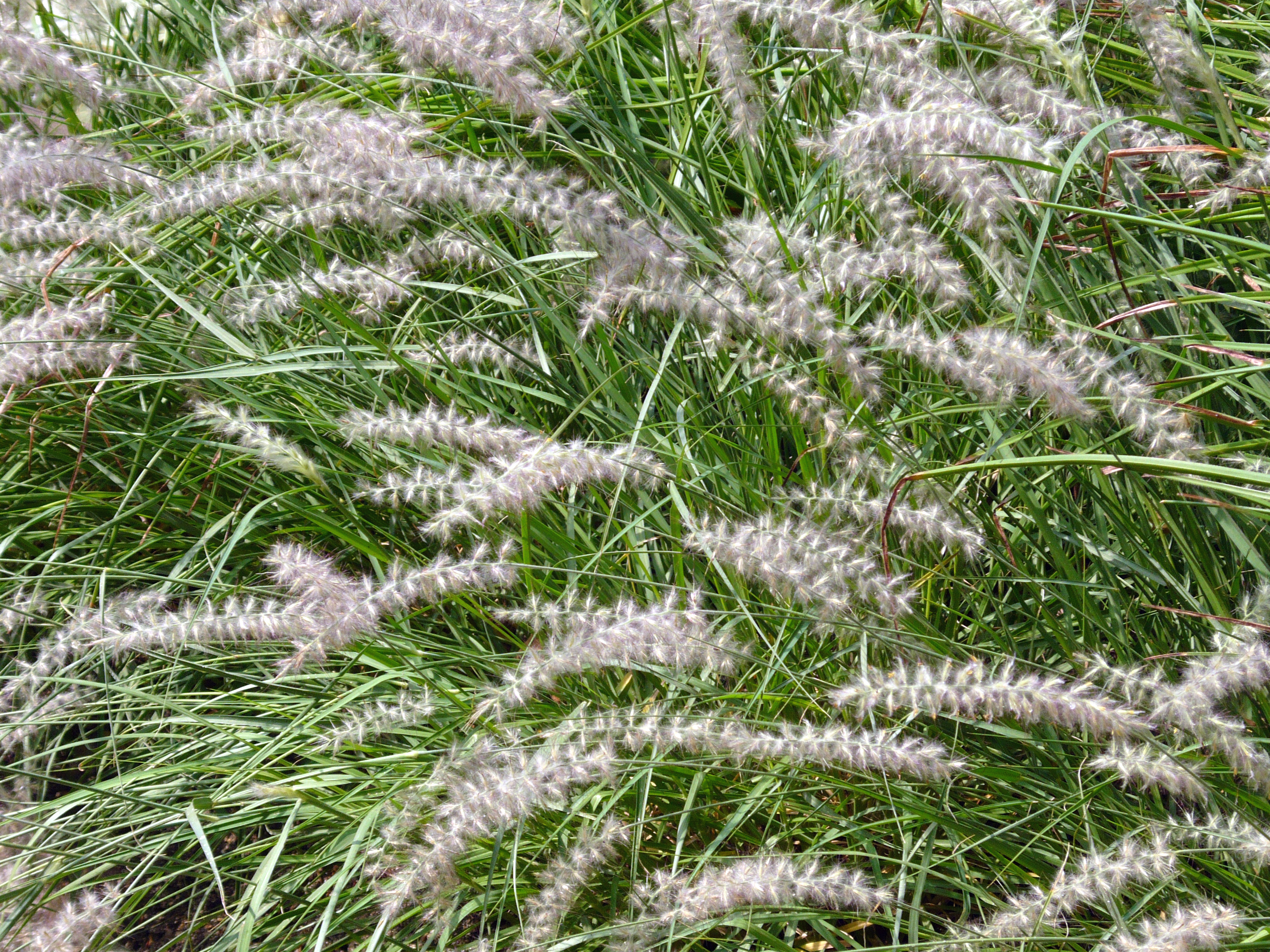 Pennisetum orientale. Real Jardín Botánico de Madrid.